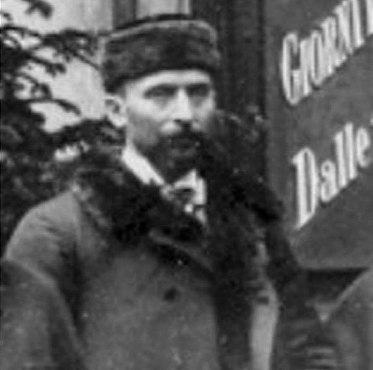 Filmfotografen och regissören Alexandre Promio